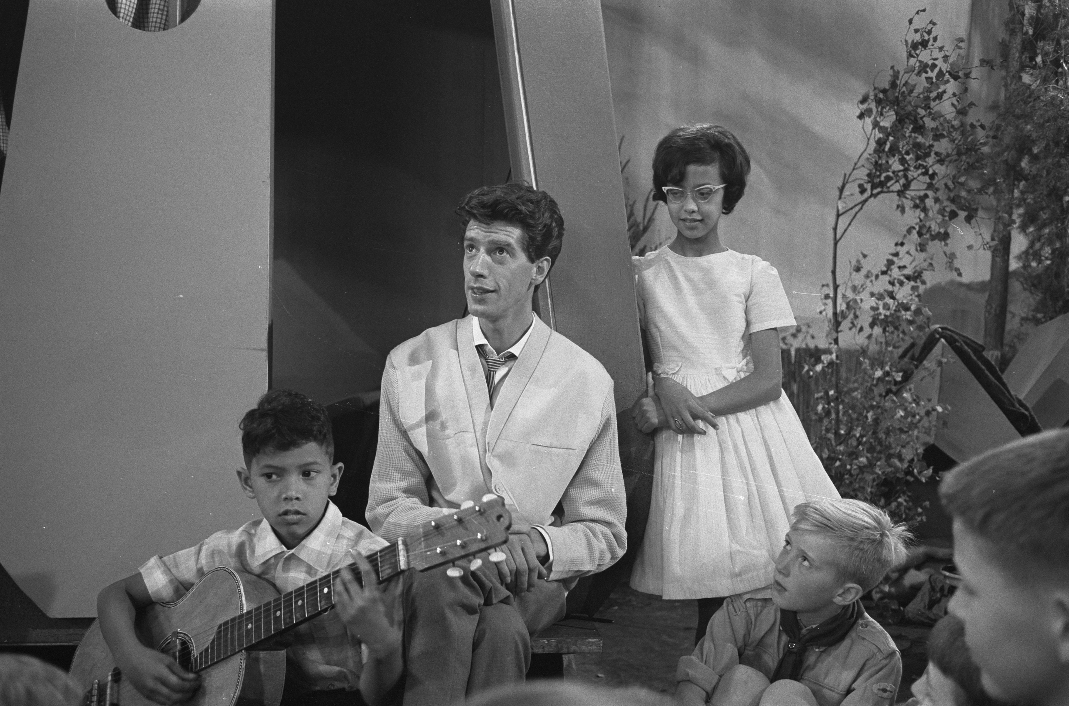 Collectie / Archief : Fotocollectie Anefo Reportage / Serie : [ onbekend ] Beschrijving : Rudi Carrell TV-show, Rudi Carrell met Frankie en rechts Sandra Annotatie : Frankie en Sandra Reemer Datum : 21 september 1962 Trefwoorden : televisieprogramma's Persoonsnaam : Carrell, Rudi, Reemer, Sandra Fotograaf : Broers, F.N. / Anefo Auteursrechthebbende : Nationaal Archief Materiaalsoort : Negatief (zwart/wit) Nummer archiefinventaris : bekijk toegang 2.24.01.05 Bestanddeelnummer : 914-3281 Reacties Geplaatst door Muziekliefhebber op 05 juli 2017 - 17:40. Sandra Reemer (bijna 12 jaar) die een liedje zong en haar broertje Frankie Reemer (10 jaar) die op zijn gitaar 'Summertime' speelde. Persoonsnaam: Reemer, Frankie; Reemer, Sandra